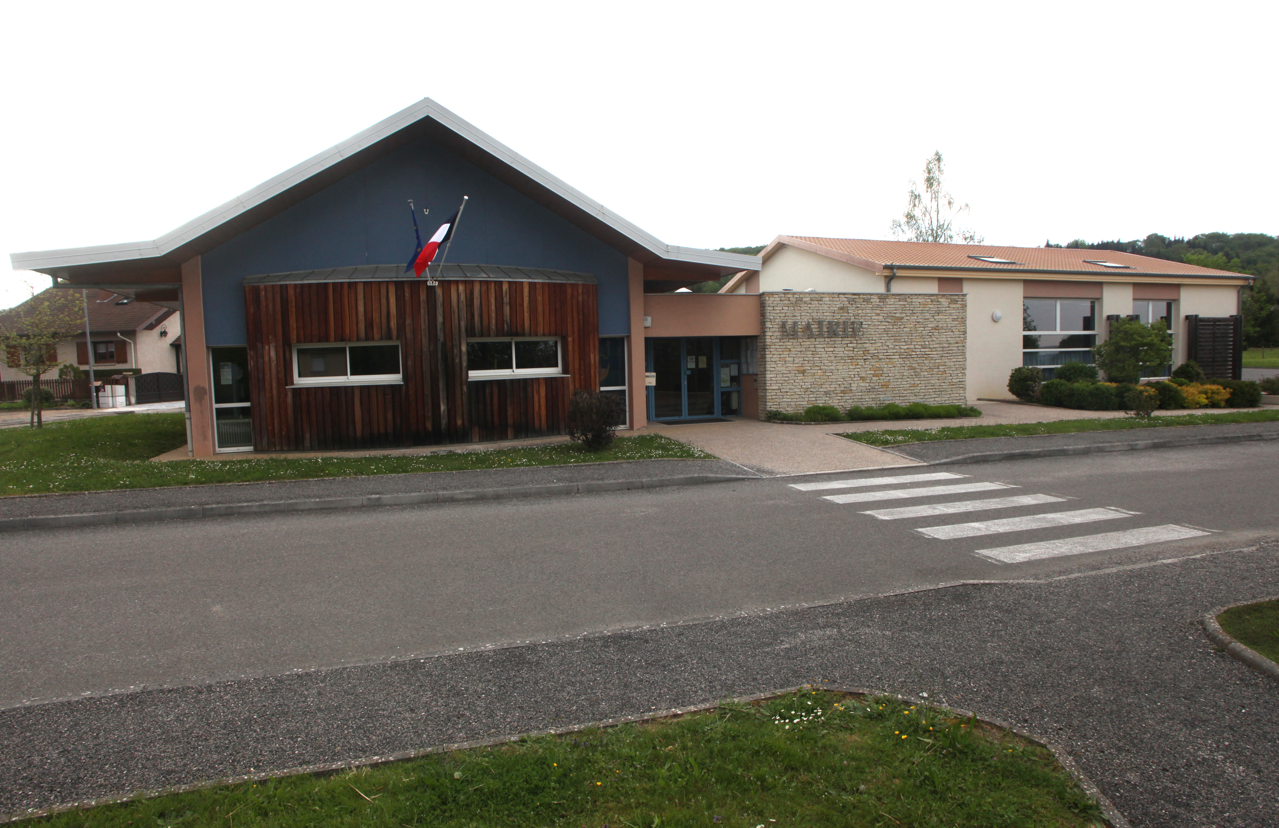 Mairie de La Vèze (Doubs).